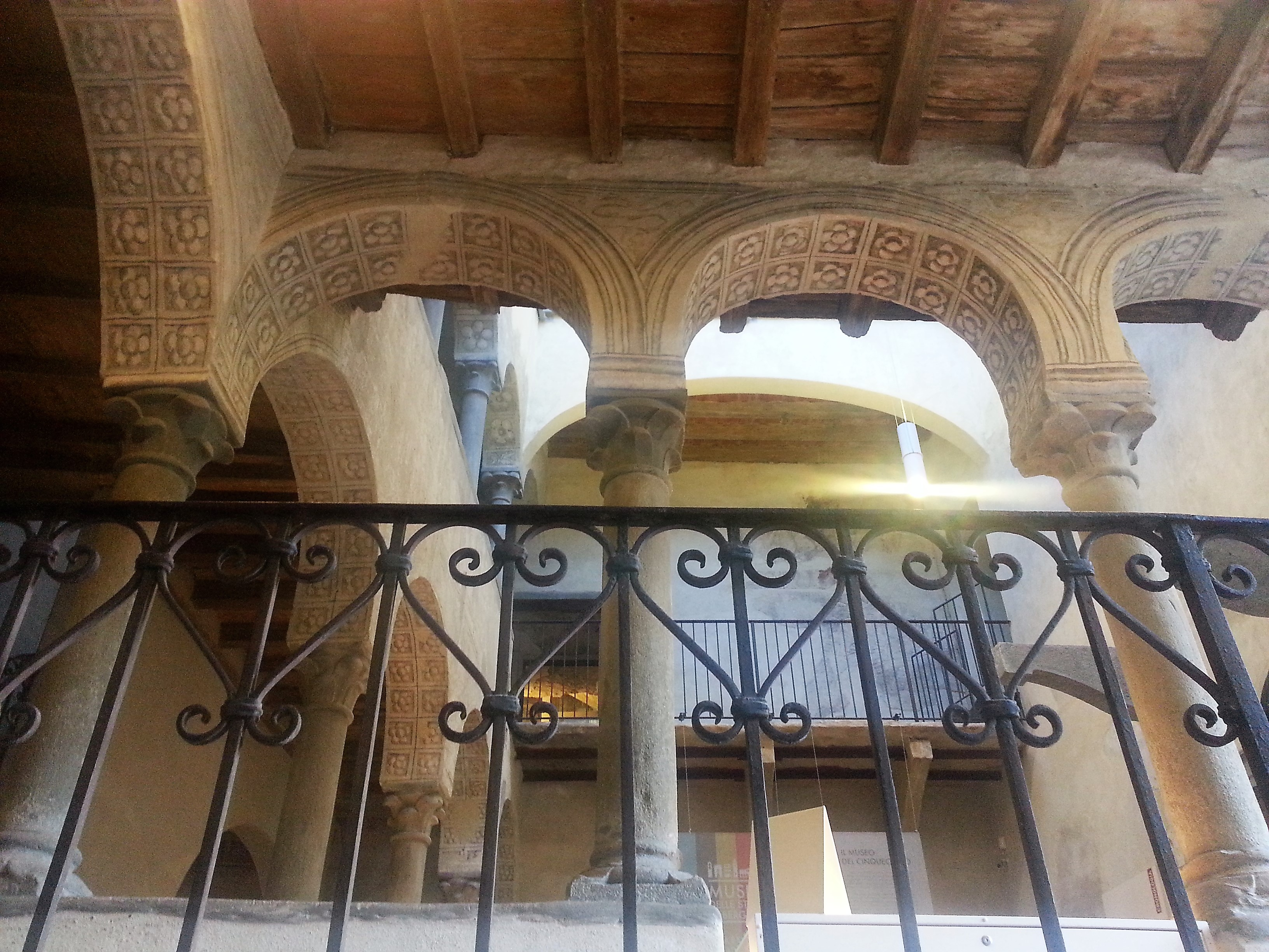 Particolare del cavedio cinquecentesco del palazzo del Podestà ora museo del Cinquecento